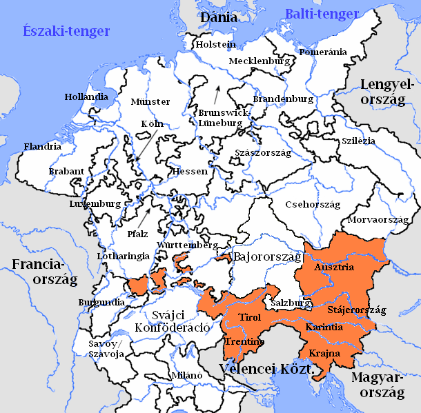 Az Ausztriai körzet a Német-római Birodalomban